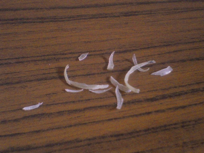 Toenail clippings